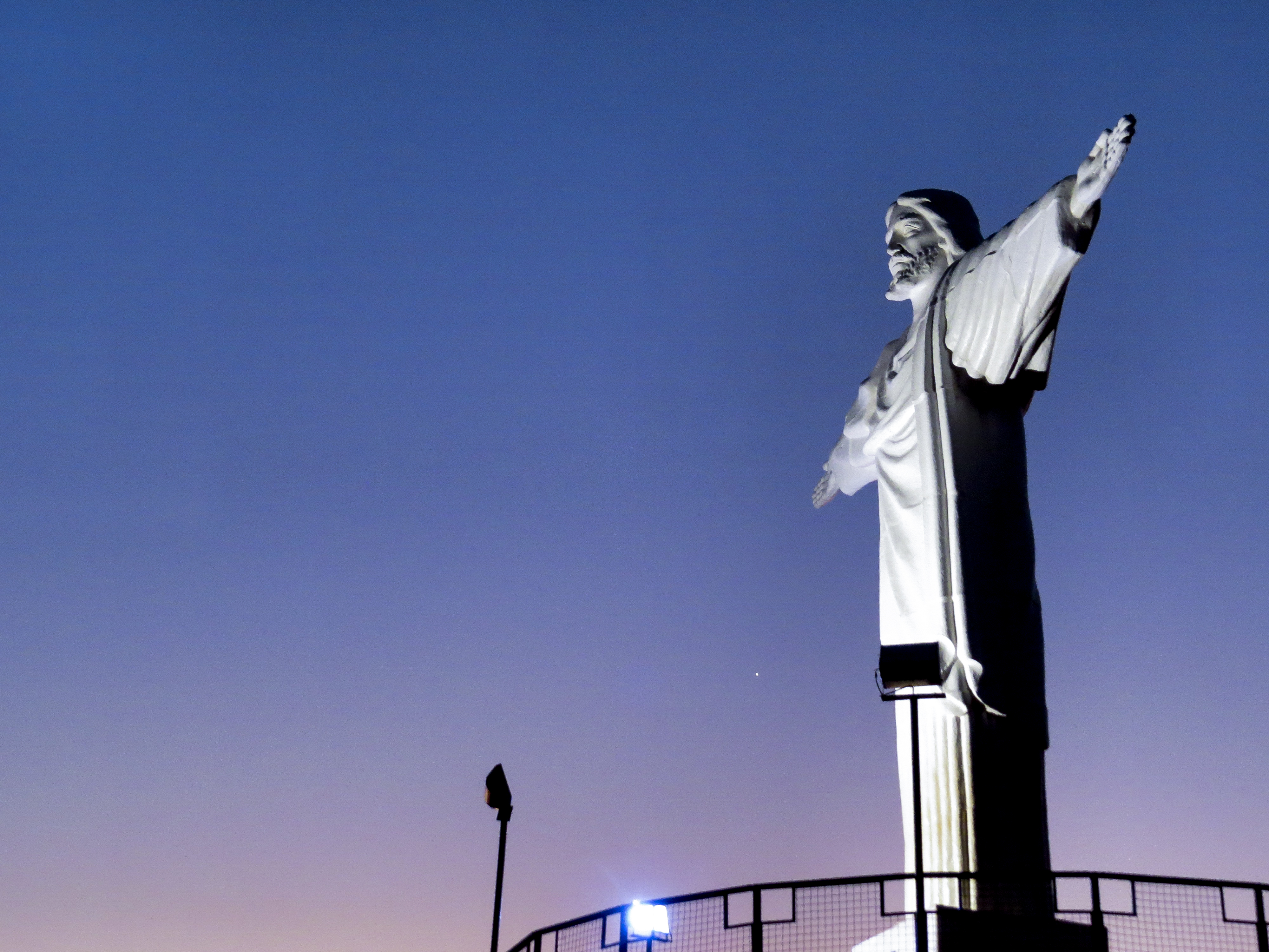 Fim de tarde no Cristo